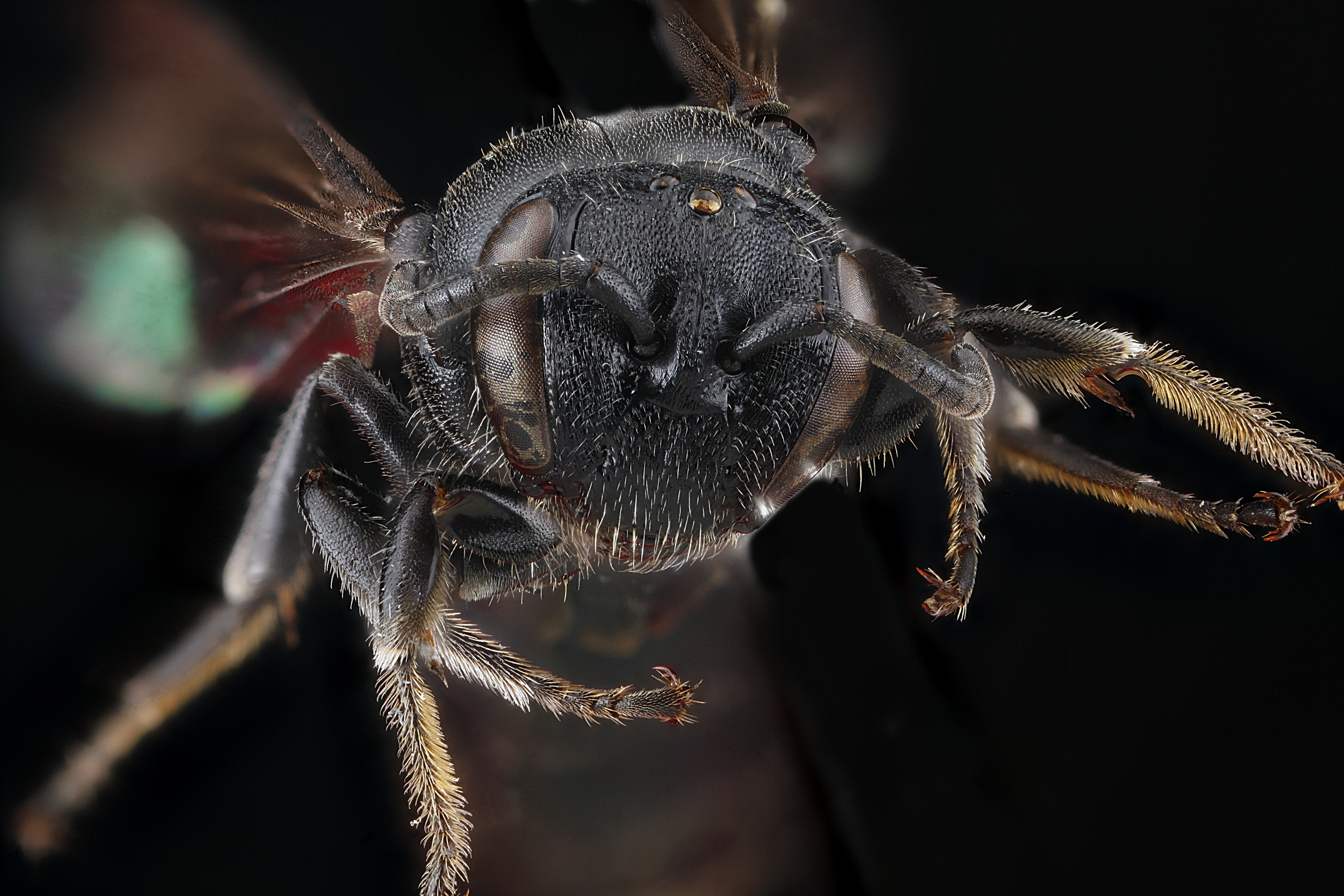 Hylaeus basalis, female